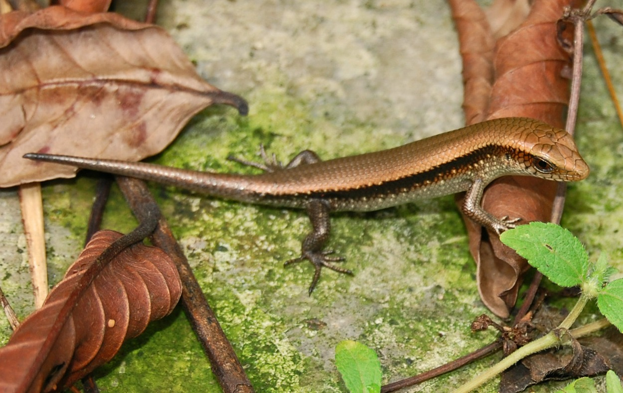 Mabuya multifasciata, juvenile from Darmaga, Bogor, West Java, Indonesia